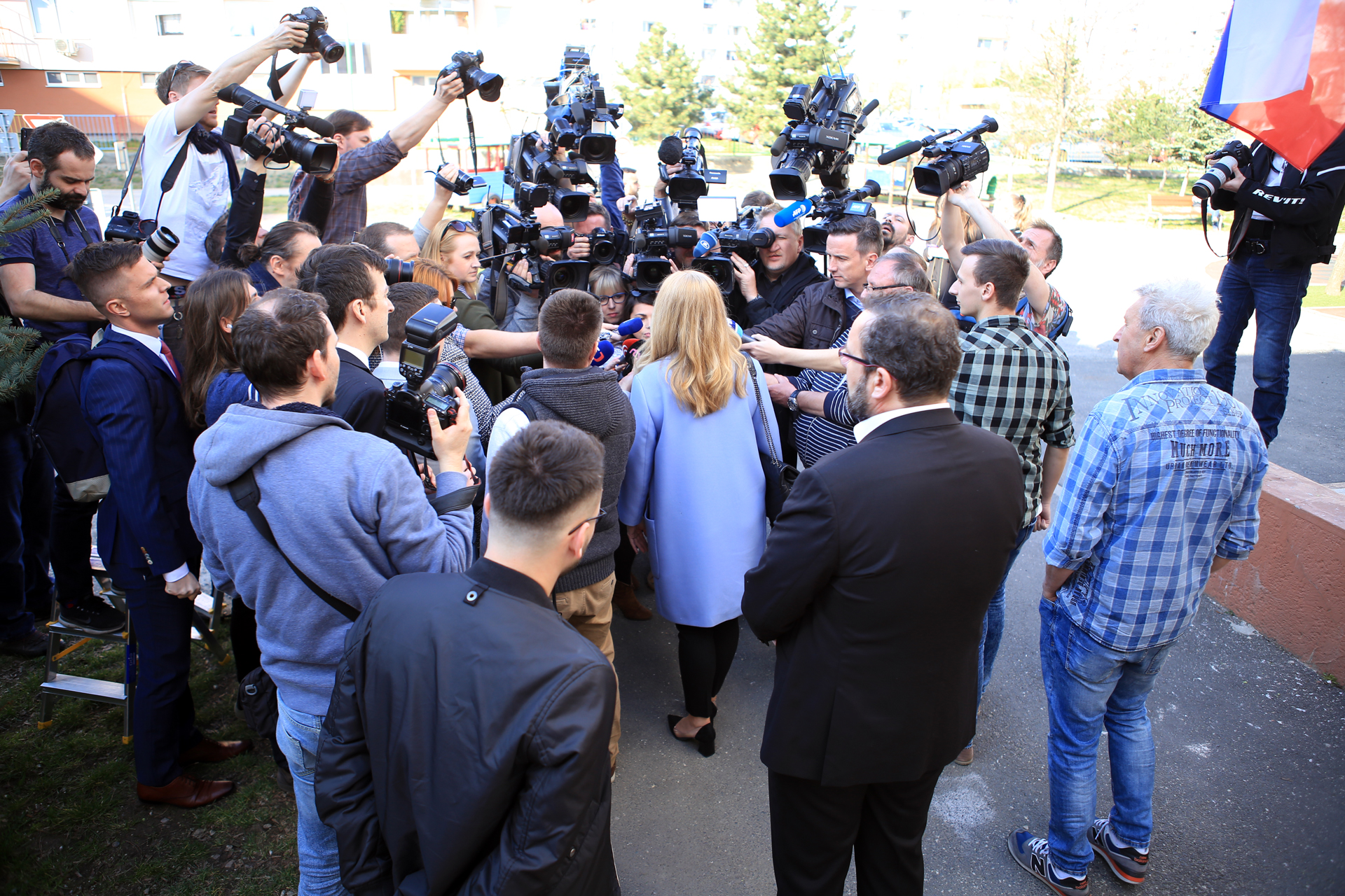 Prezidentská kandidátka Zuzana Čaputová poskytuje rozhovor po odvolení v druhom kole prezidentských volieb 2019 v priestoroch Materskej školy na Svätoplukovej 51 v Pezinku.